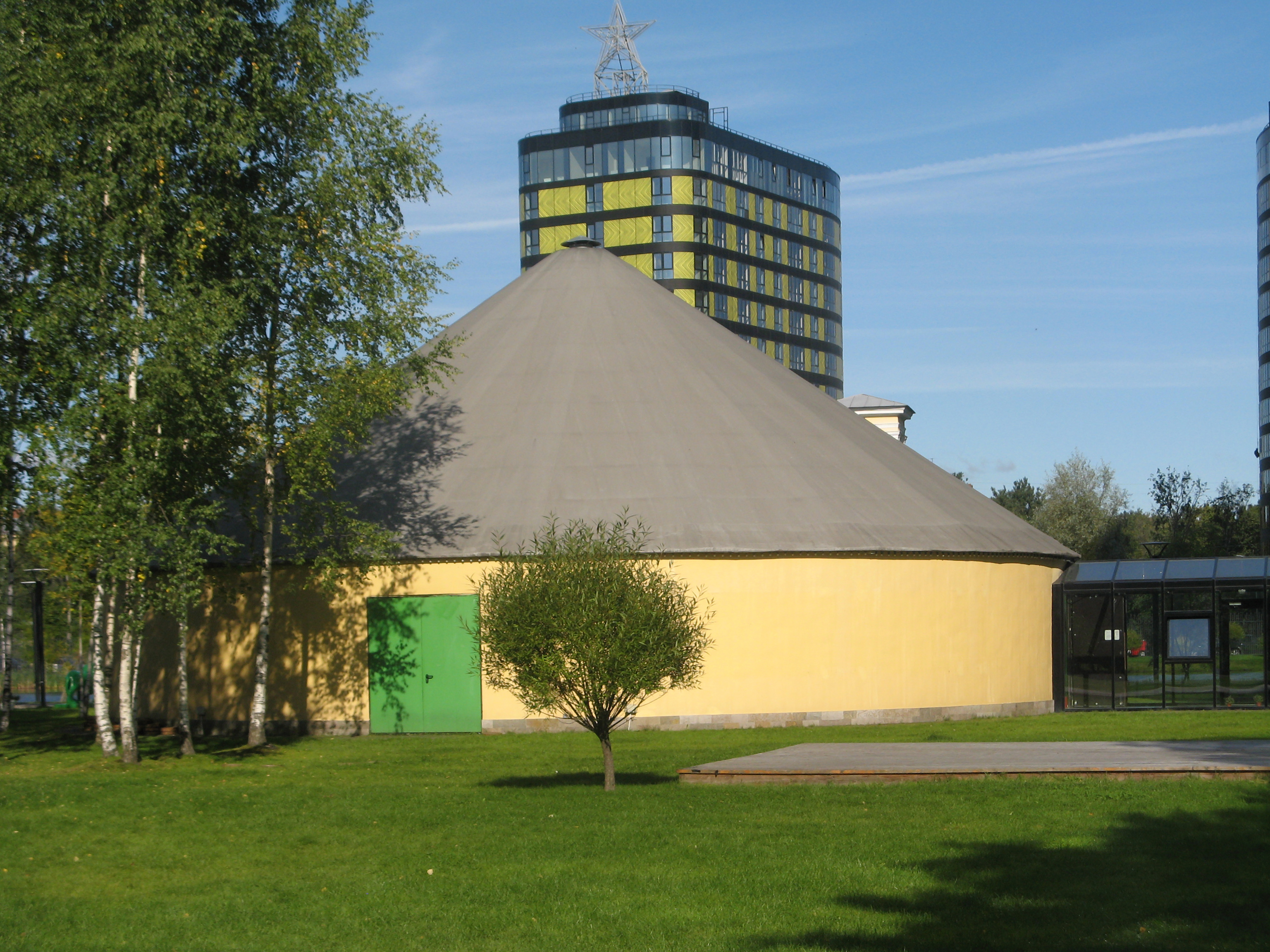 Шатер "Упсала-цирка", Санкт-Петербург